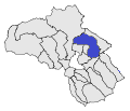 Font-romeu, Odelló i Vià a l'Alta Cerdanya, mapa fet a partir d'un altre mapa de lliure disposició